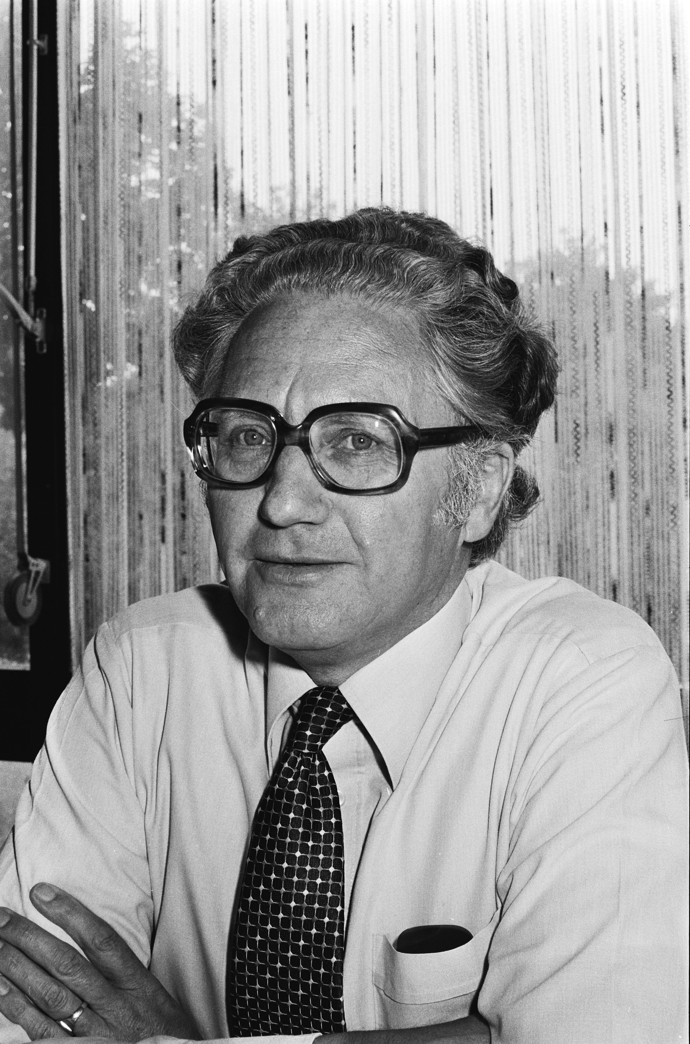 Collectie / Archief : Fotocollectie Anefo Reportage / Serie : CNV verbondsraad bijeen in Utrecht Beschrijving : CNV voorzitter v.d. Meulen Datum : 11 juni 1979 Locatie : Utrecht (provincie), Utrecht (stad) Trefwoorden : portretten, vakbonden, voorzitters Persoonsnaam : Meulen, Harm van der Instellingsnaam : CNV Fotograaf : Suyk, Koen / Anefo Auteursrechthebbende : Nationaal Archief Materiaalsoort : Negatief (zwart/wit) Nummer archiefinventaris : bekijk toegang 2.24.01.05 Bestanddeelnummer : 930-3074